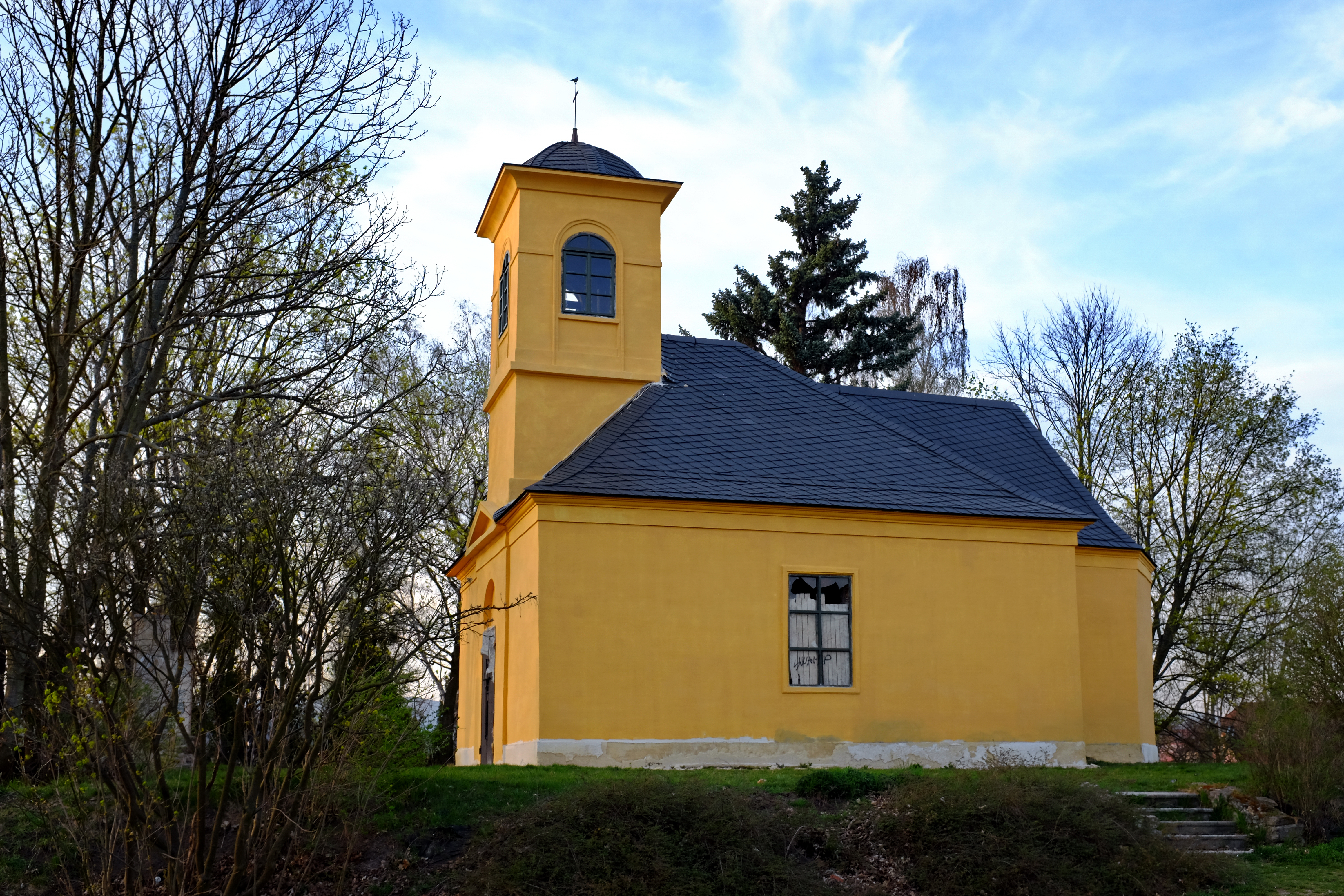 Kostel svatého Urbana, parc. 201/1–3, Rybáře (Karlovy Vary).